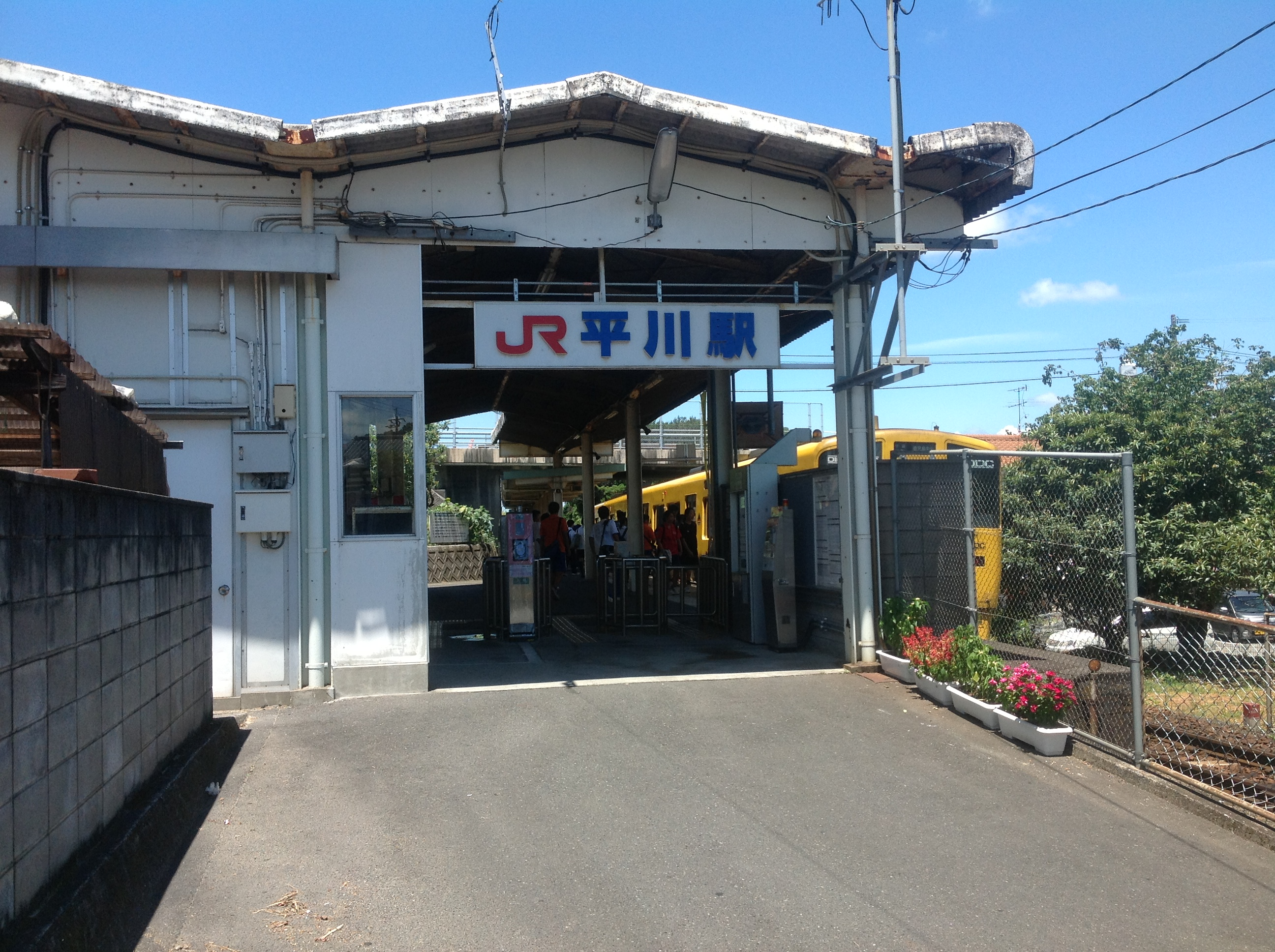 平川駅入り口